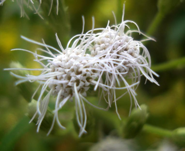 Name : Chromolaena odoratum Family : Asteraceae കമ്യൂണിസ്റ്റ് പച്ചയുടെ വെള്ളനിറമുള്ള വളരെ ചെറിയ പൂക്കൾ കുലകളായി കാണപ്പെടുന്നു. വേനലിൽ ഉണങ്ങിയ വിത്തുകൾ പുതുമഴക്ക് ശേഷം വീണ്ടും ഉണങ്ങിയാൽ കാറ്റത്ത് പറന്ന് ദൂരെസ്ഥലങ്ങളിൽ എത്തിയിട്ട് മുളച്ച് വളരുന്നു.